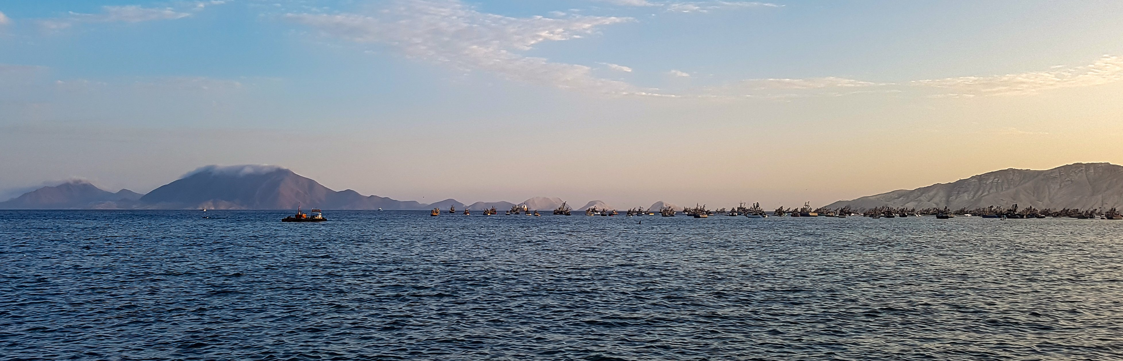 Puerto de Chimbote, Peru